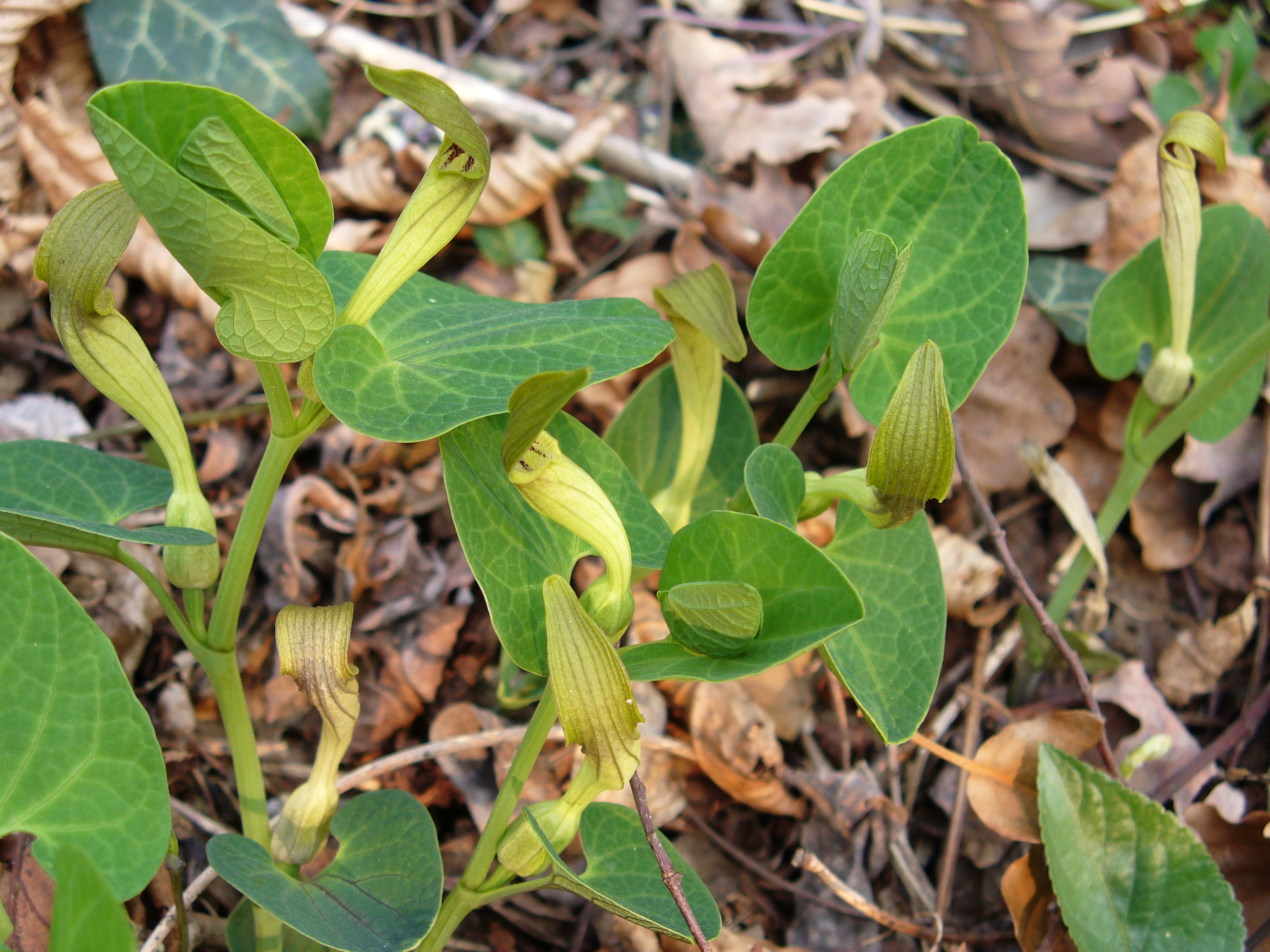 Aristolochia lutea